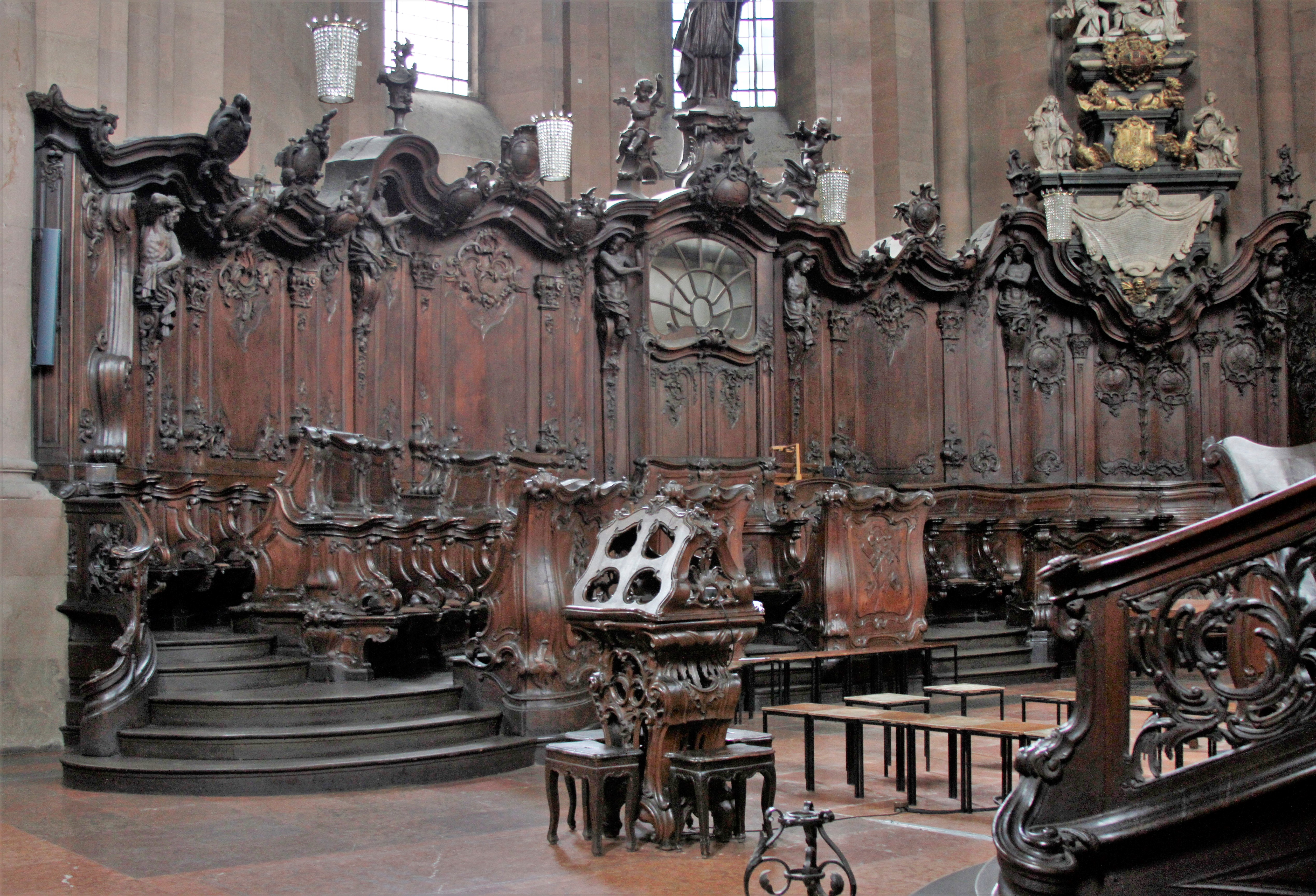 Mainz Cathedral - Mainz - Germany